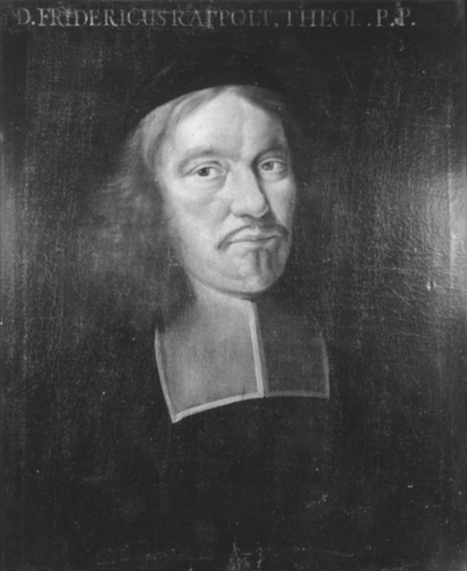 Friedrich Rappolt (* 26. Januar 1615; 27. Dezember 1676), deutscher Pädagoge und Philologe